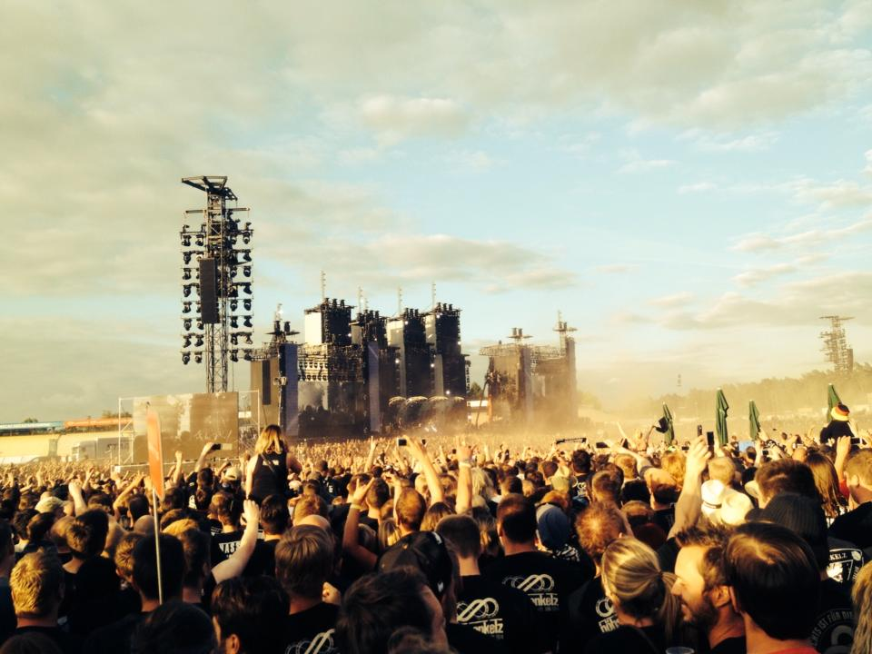 Bühne beim Comeback am 20.06.2014